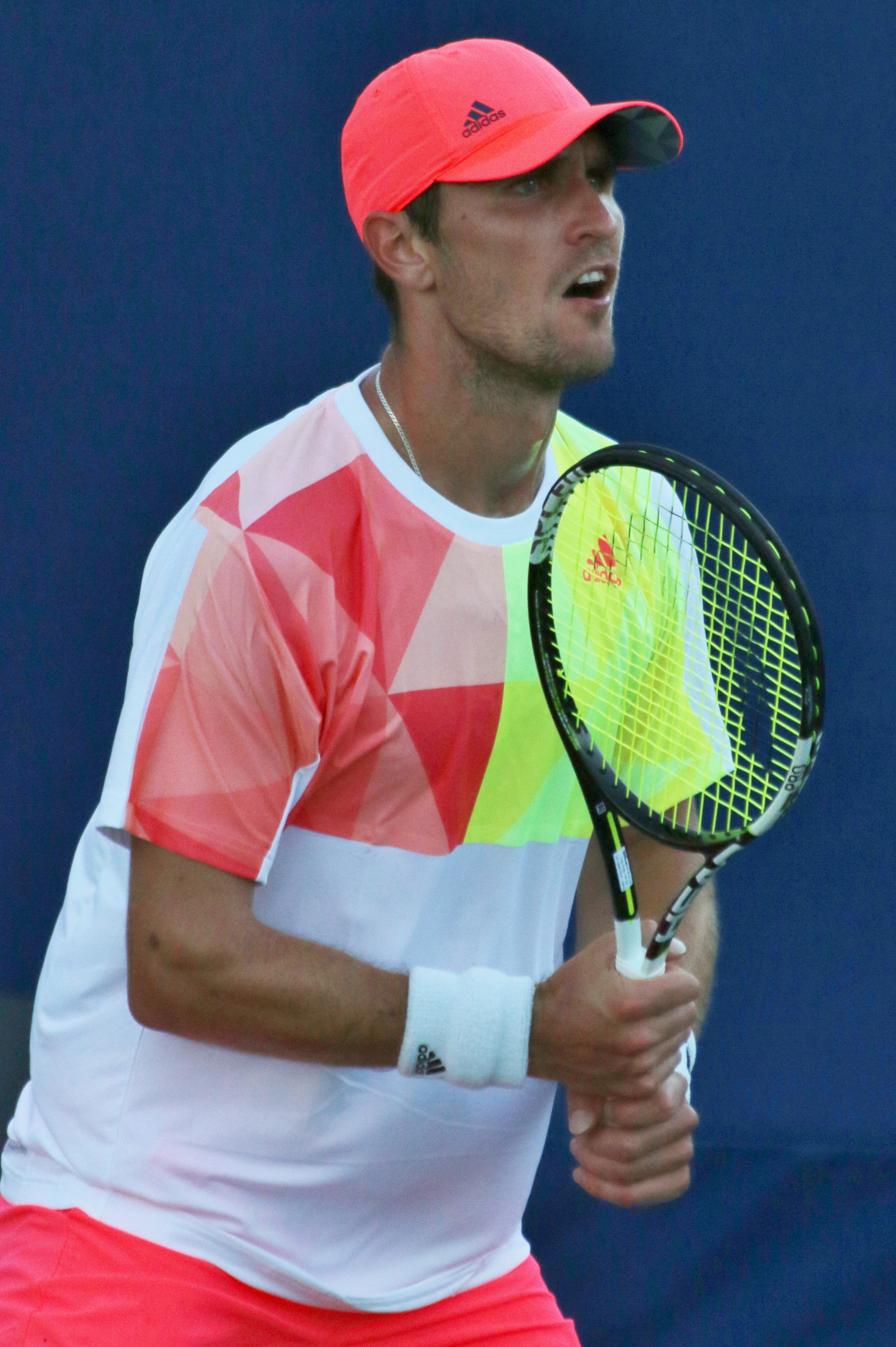 Zverev M. US16 (14)